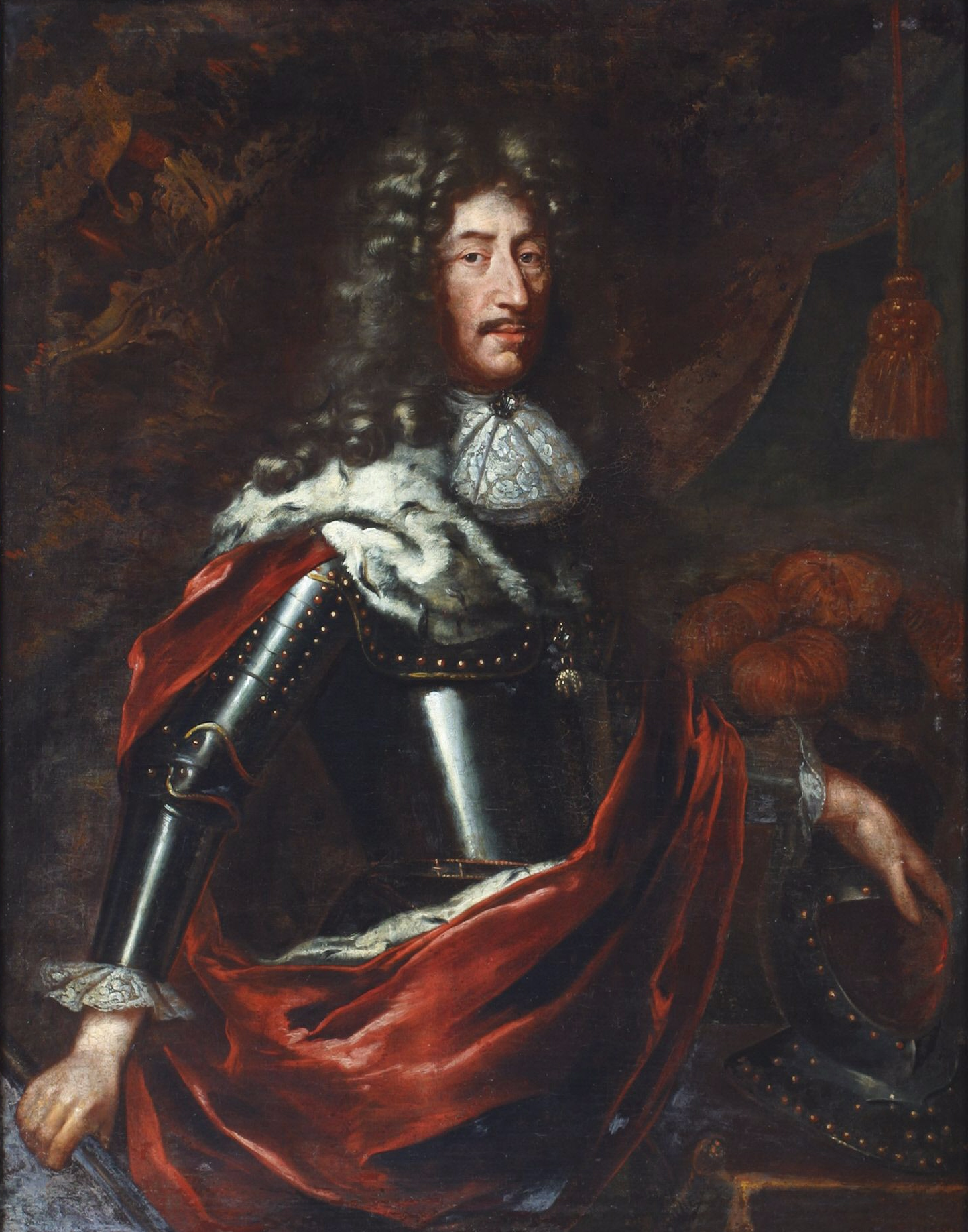 Philipp Wilhelm (1615 - 1690), Pfalzgraf bei Rhein zu Neuburg, Herzog von Jülich-Berg, seit 1685 Kurfürst von der Pfalz